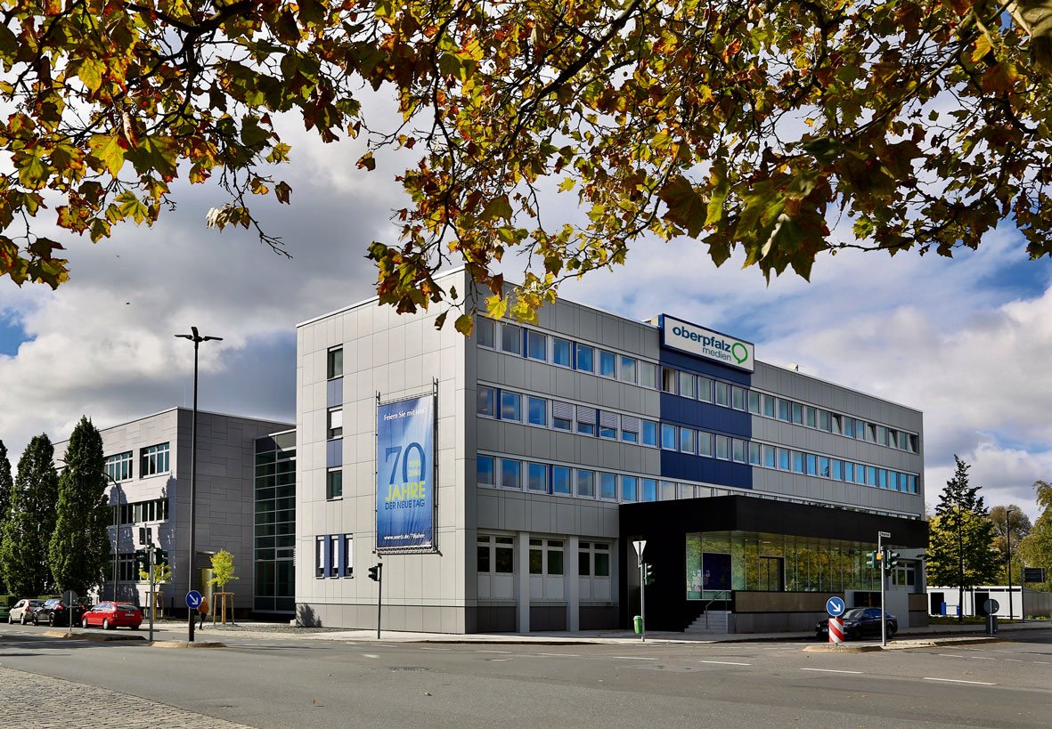 Das renovierte Gebäuder von Oberpfalz Medien